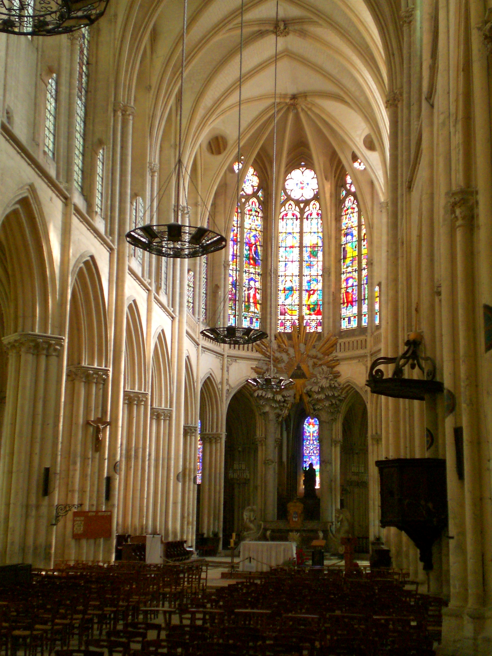 Interieur Eglise